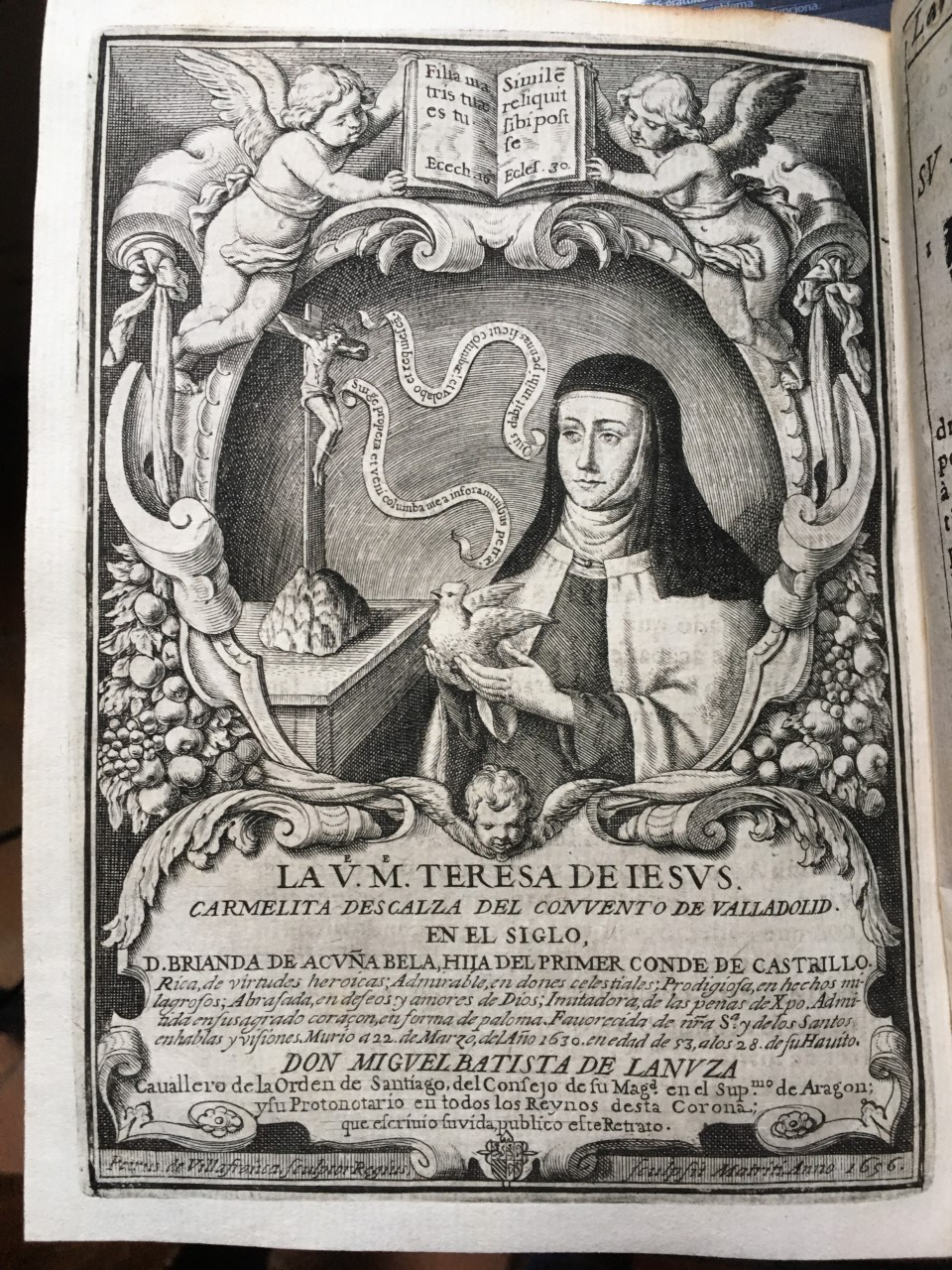 Retrato de Brianda de Acuña y Vela, hija de Bernardino de Avellaneda, y monja carmelita descalza en Valladolid con el nombre de Teresa de Jesús. Este grabado realizado por Pedro de Villafranca en 1656, está inserto en la biografía que sobre ella escrisbió Juan Batista de Lanuza.